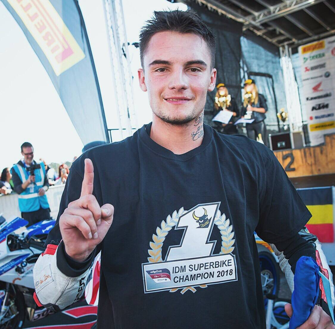 Фото снято в Hockenhaim , Germany на финальном этапе IDM Sbk.